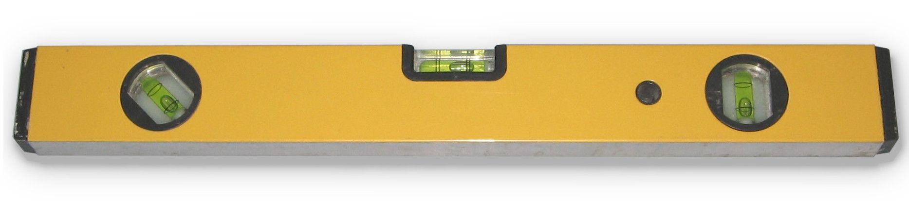 Konstrua nivelilo La foto estis farita de mi mem.